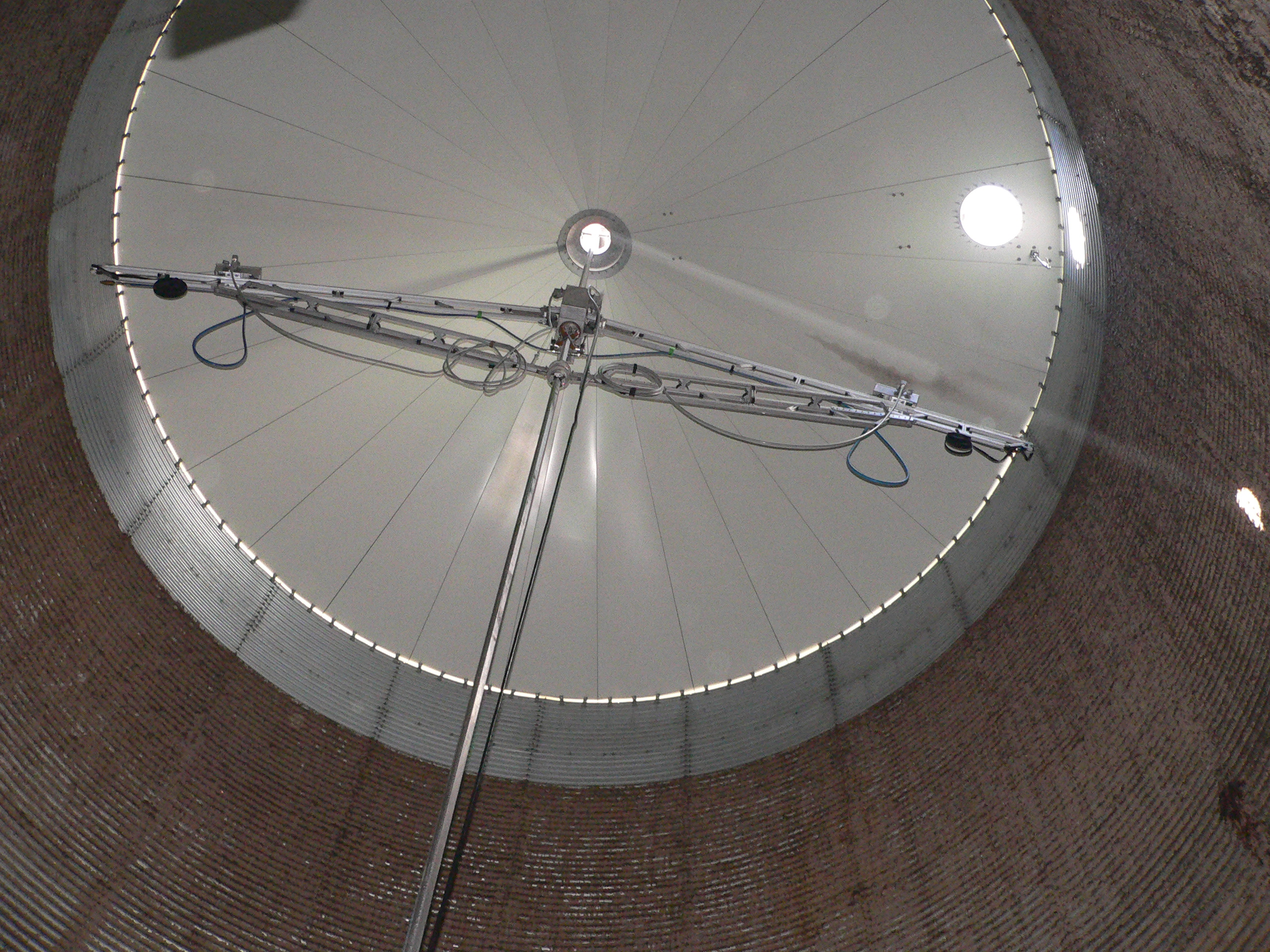 Siloreininger im Einsatz